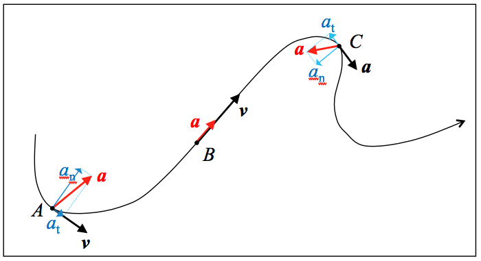 Partikularen higiduraren ibilbideko hiru puntutan abiadurak eta azelerazioak dituzten norabideen irudi grafikoa.